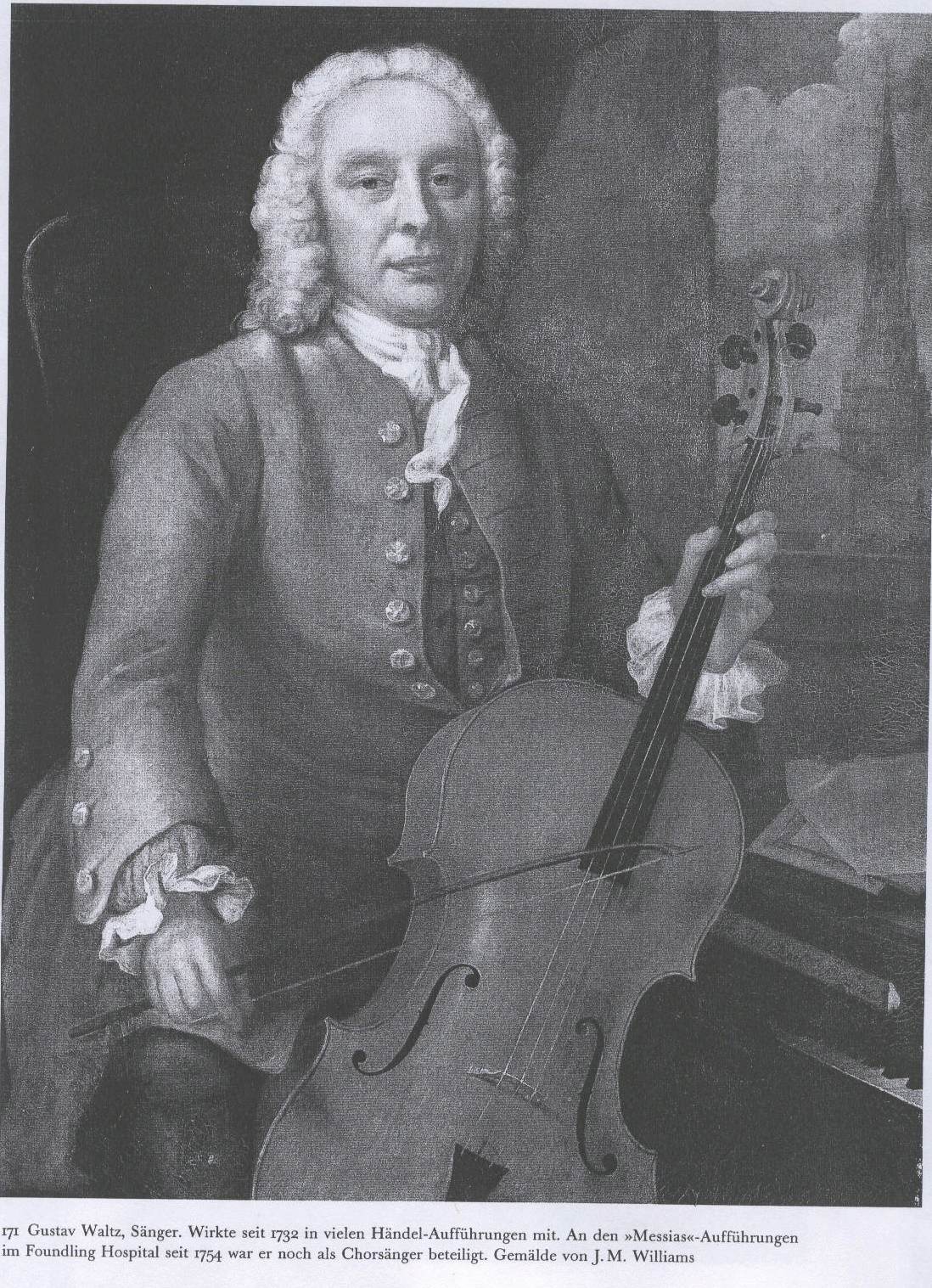 Gustavus Waltz, bass singer